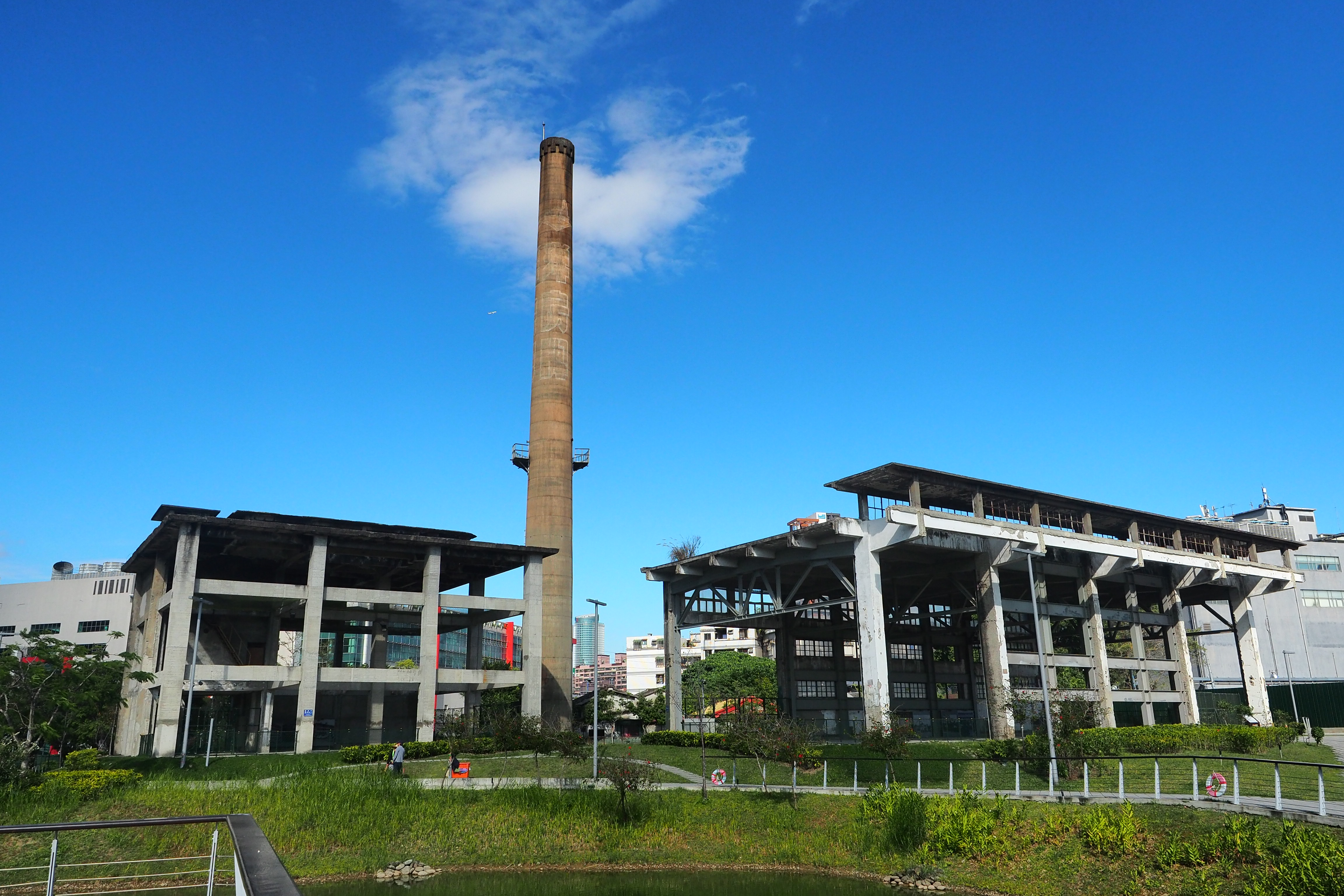 中文（台灣）: 中央公園原位於遠東紡織廠內，富含台灣紡織發展歷史，於北公園設定875平方公尺的煙囪保留區，包含煙囪與相鄰臨二棟舊有建築物，保留具文化價值資產。